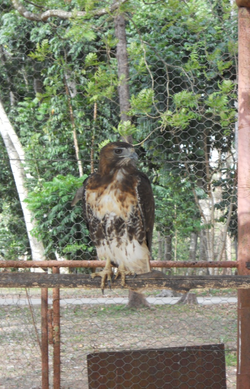 Gavilan en cautiverio